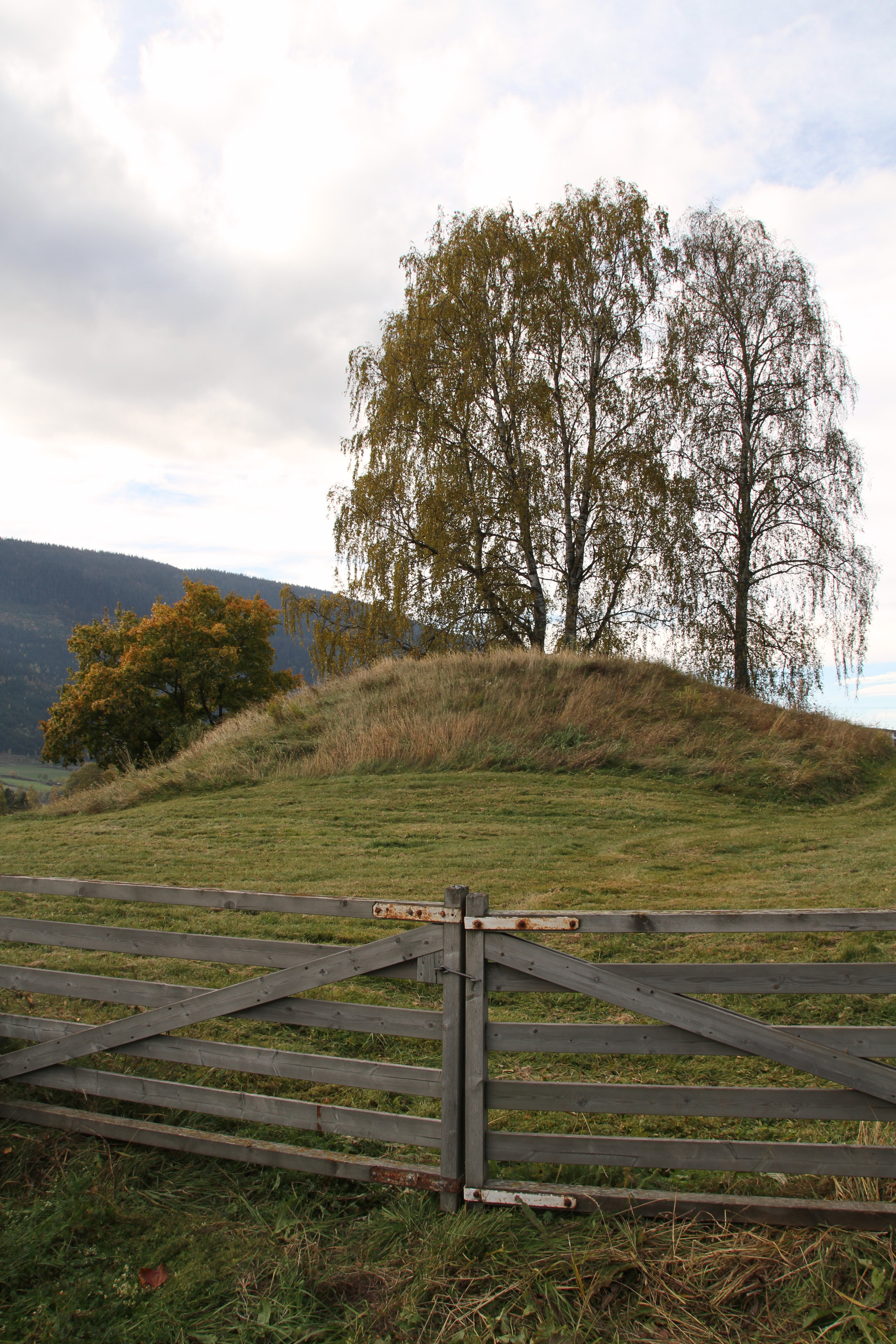 Gården Hundorp, område i nord hvor det er en oldtids gravhaug på gårdsområdet. Sør-Fron i Oppland.